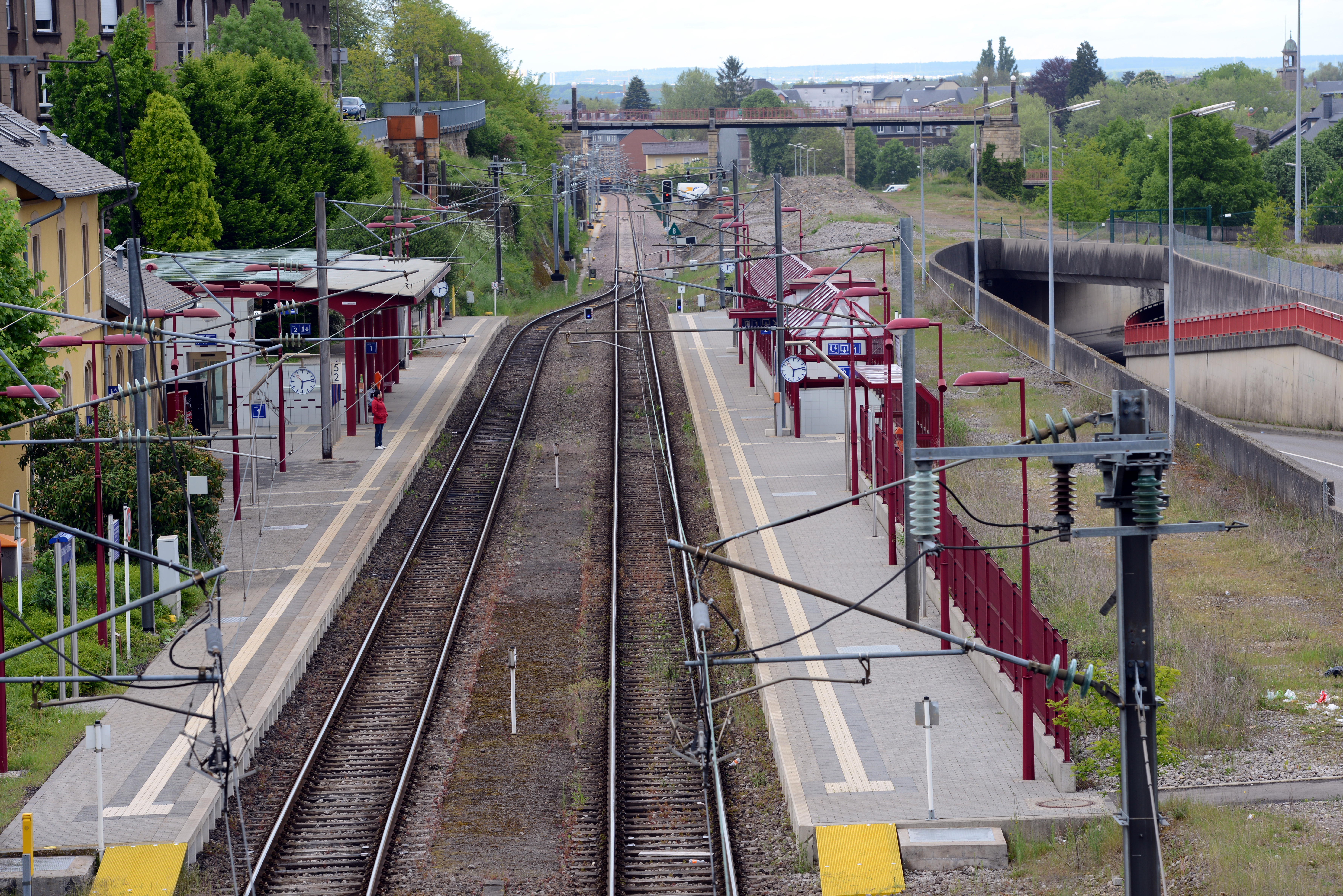 D'Gare-Usines zu Diddeleng.